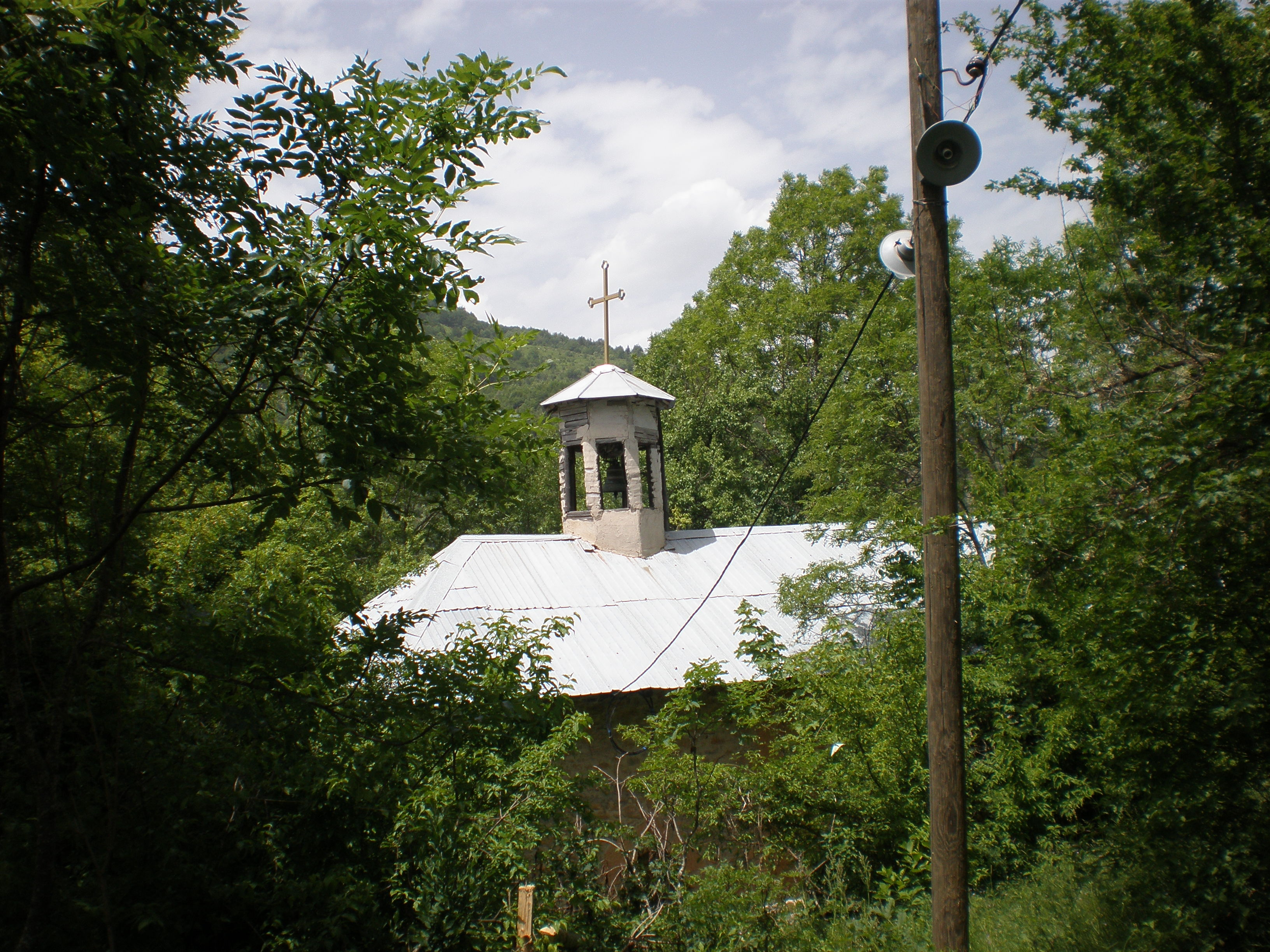 Црква Свети Димитрија во селото Волковија